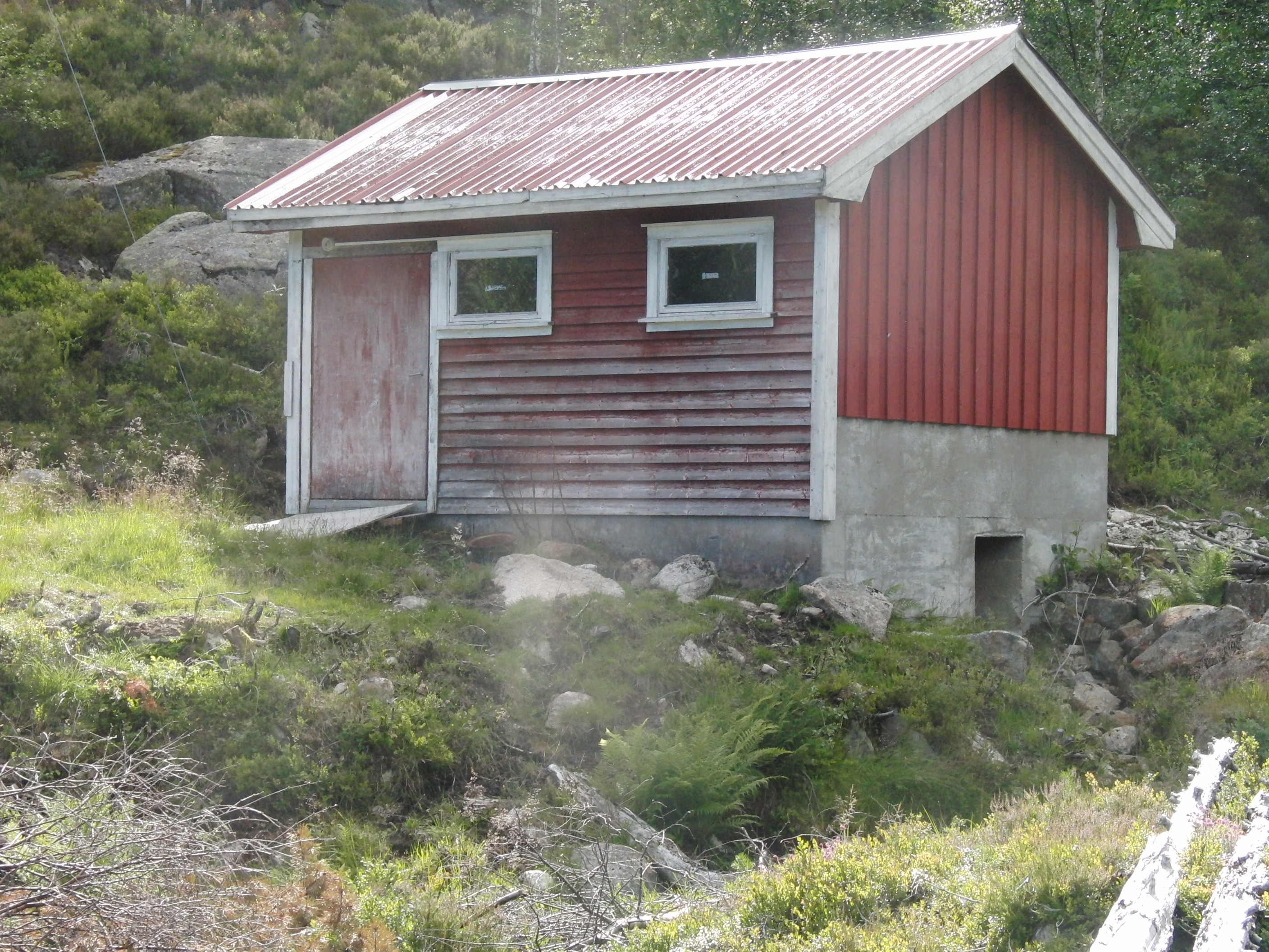 Det første kraftverket på Eftestøl